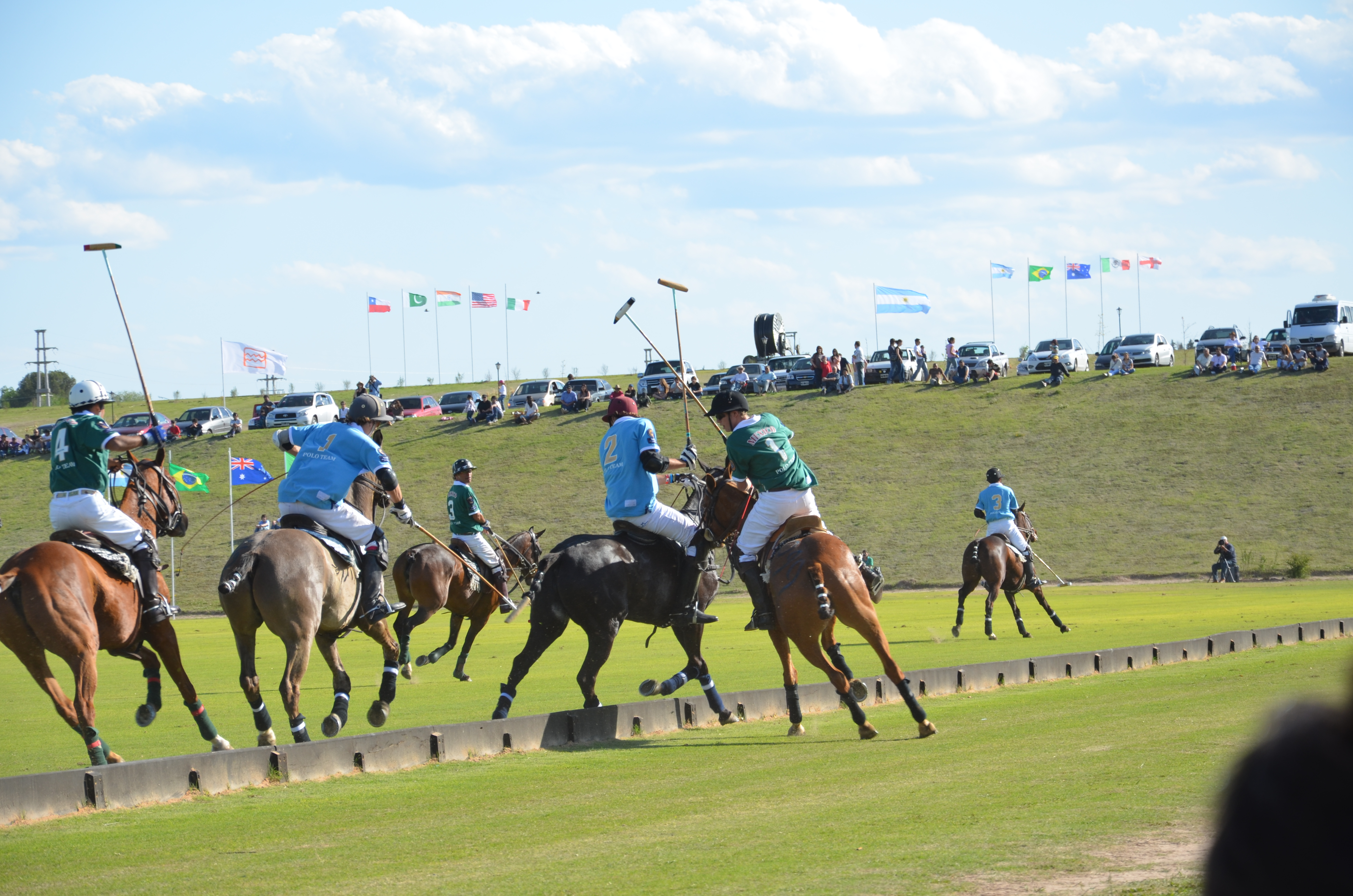 Mundial De Polo San Luis 2011